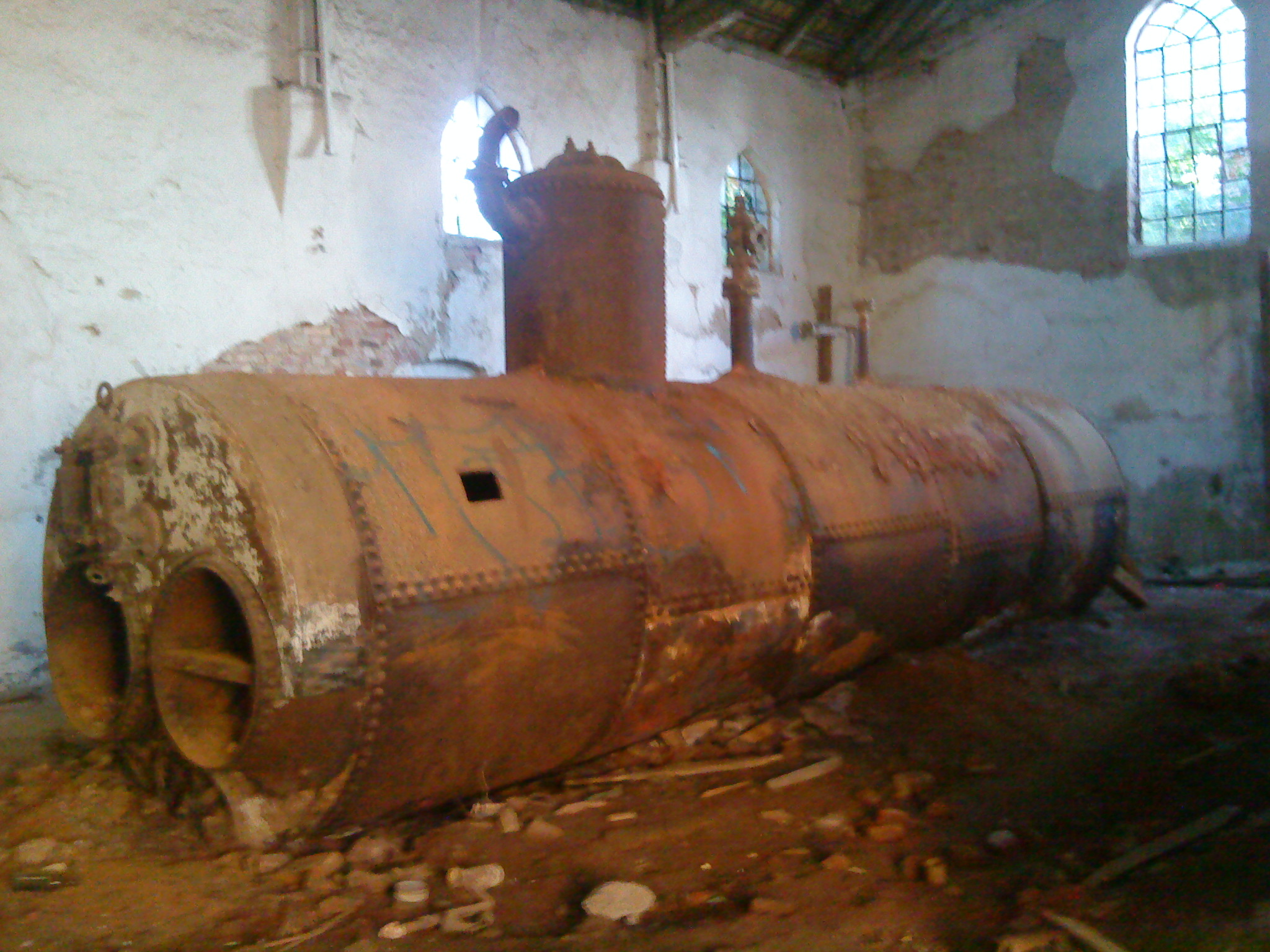 Landesanstalt Strelitz